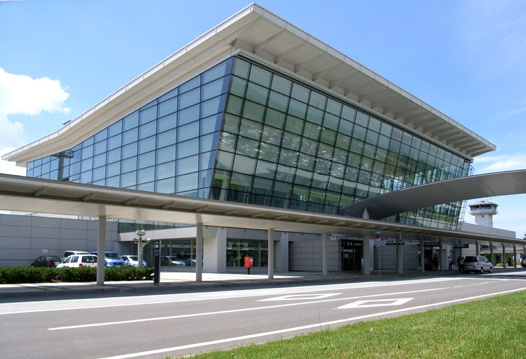 旭川空港 Photographer:Birdman Date:2006/07/09